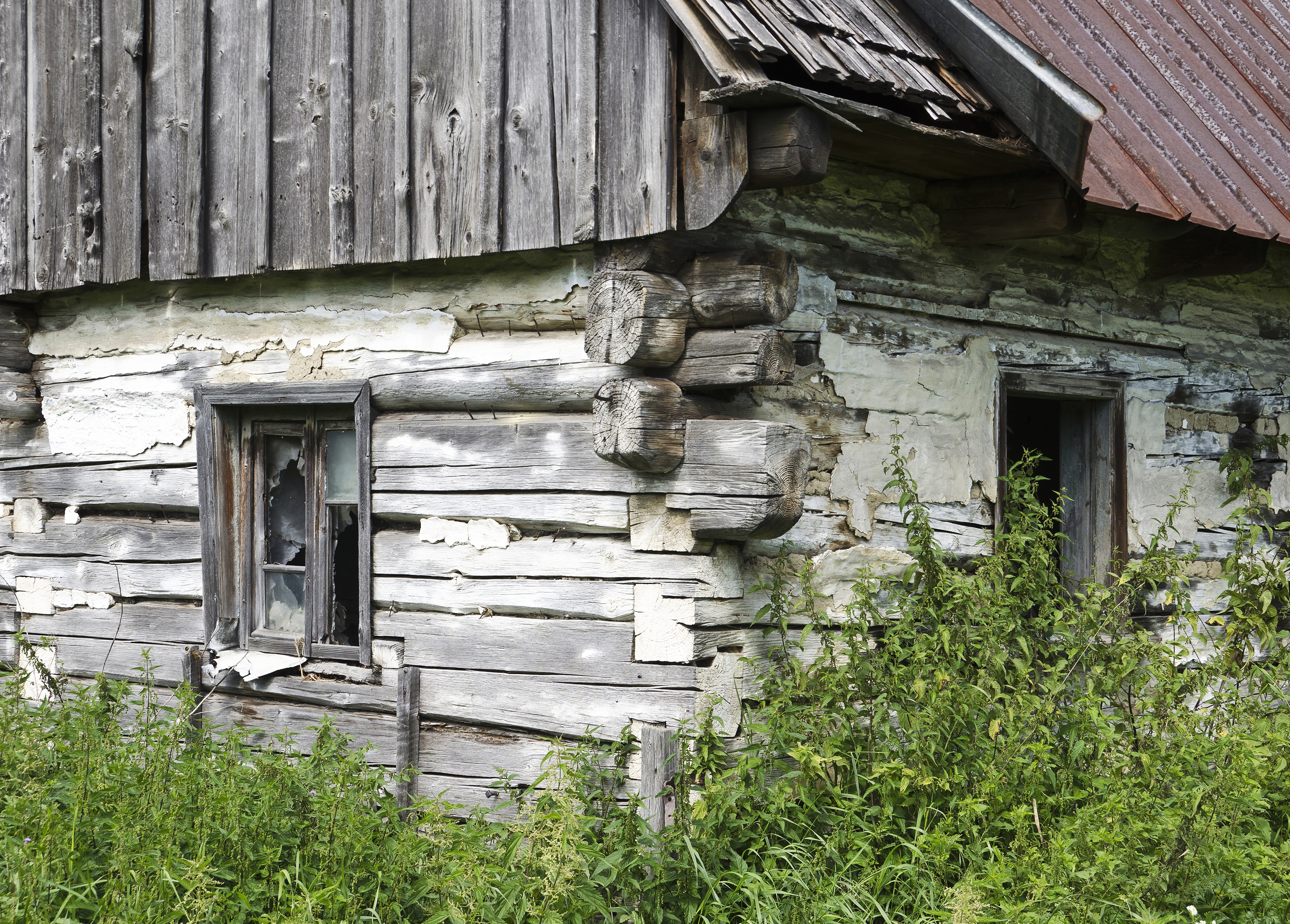 Stary Waliszów, dom nr 67, pocz. XIX